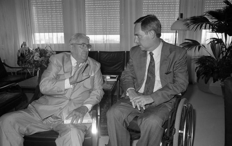 Bonn, 7.8.1991 Der Bundesminister des Innern, Dr. Wolfgang Schäuble, empfing den früheren Botschafter der Vereinigten Staaten von Amerika, Vernoon Walters, zu einem Abschiedsbesuch im Bundesinnenministerium.